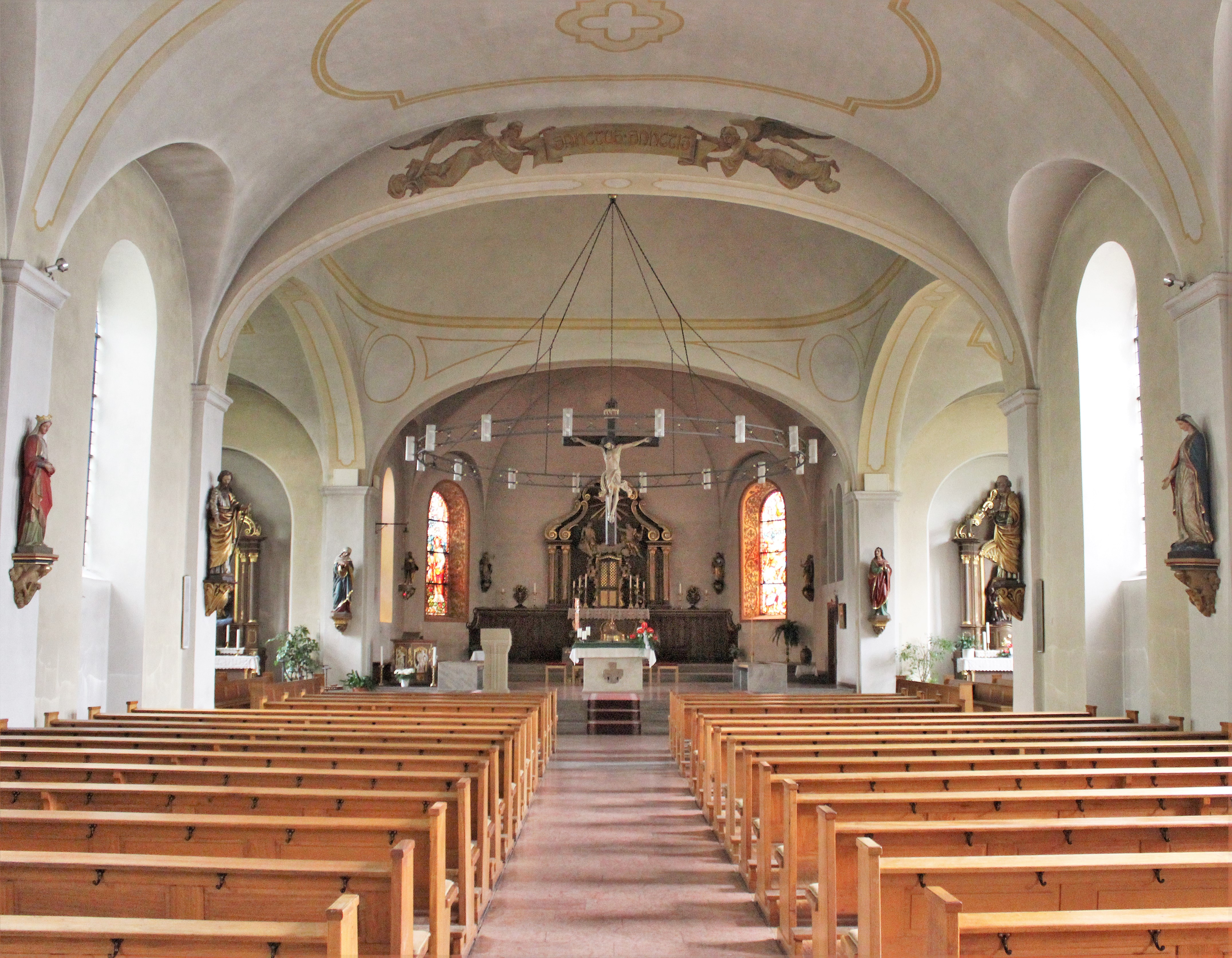 Blick ins Innere der katholischen Pfarrkirche St. Peter und Paul in Nalbach, Landkreis Saarlouis, Saarland